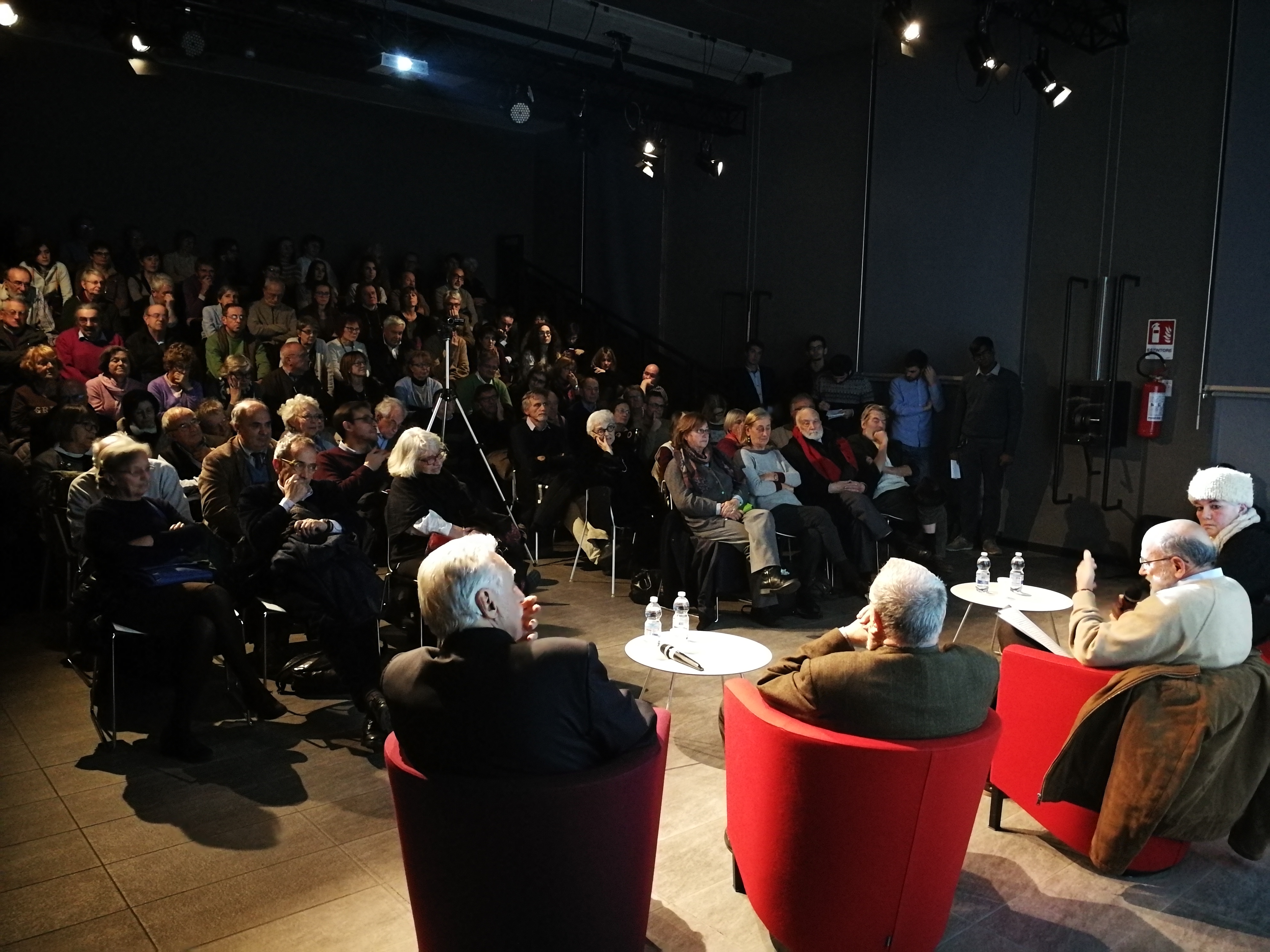 La Sala del '900, al piano terra di Palazzo San Daniele, ospita un evento.